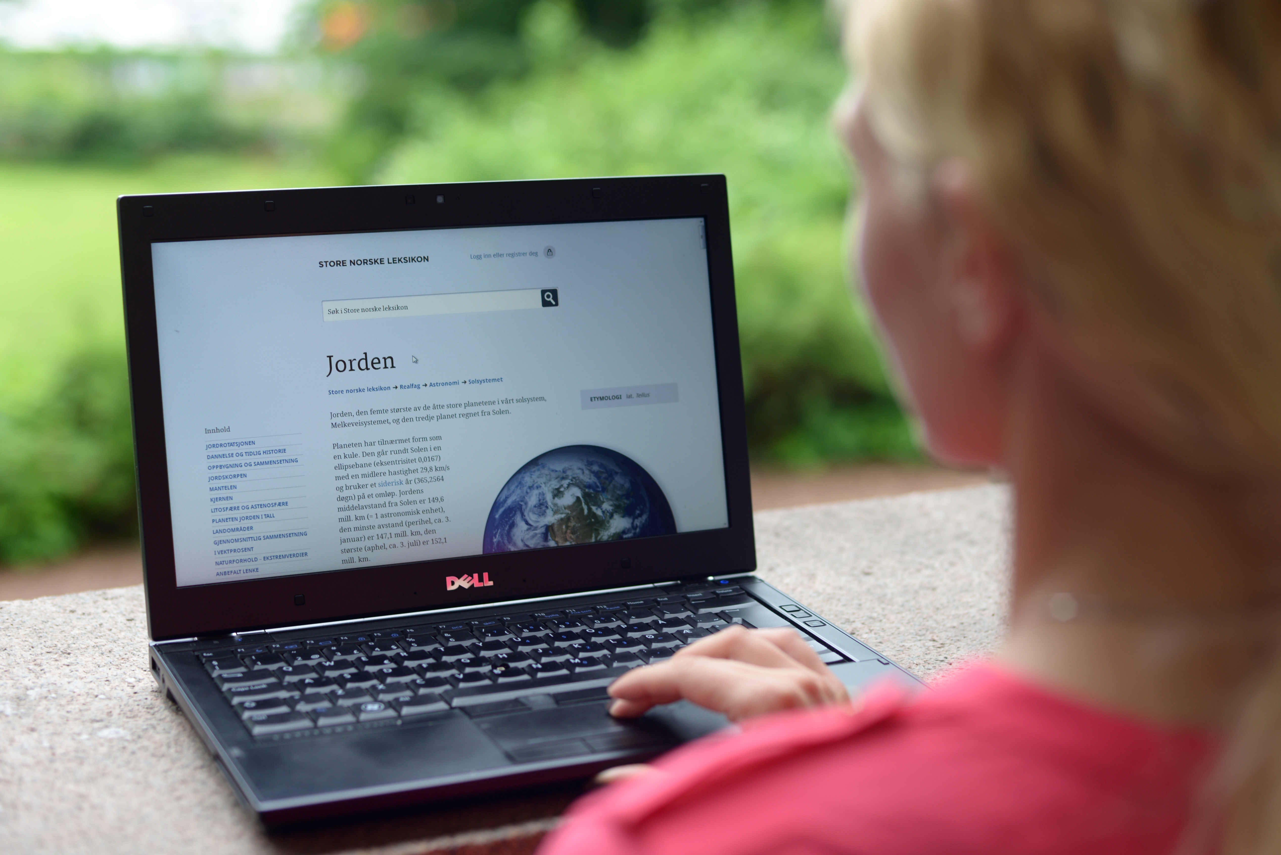 Store norske leksikon, laptop. snl.no SNL